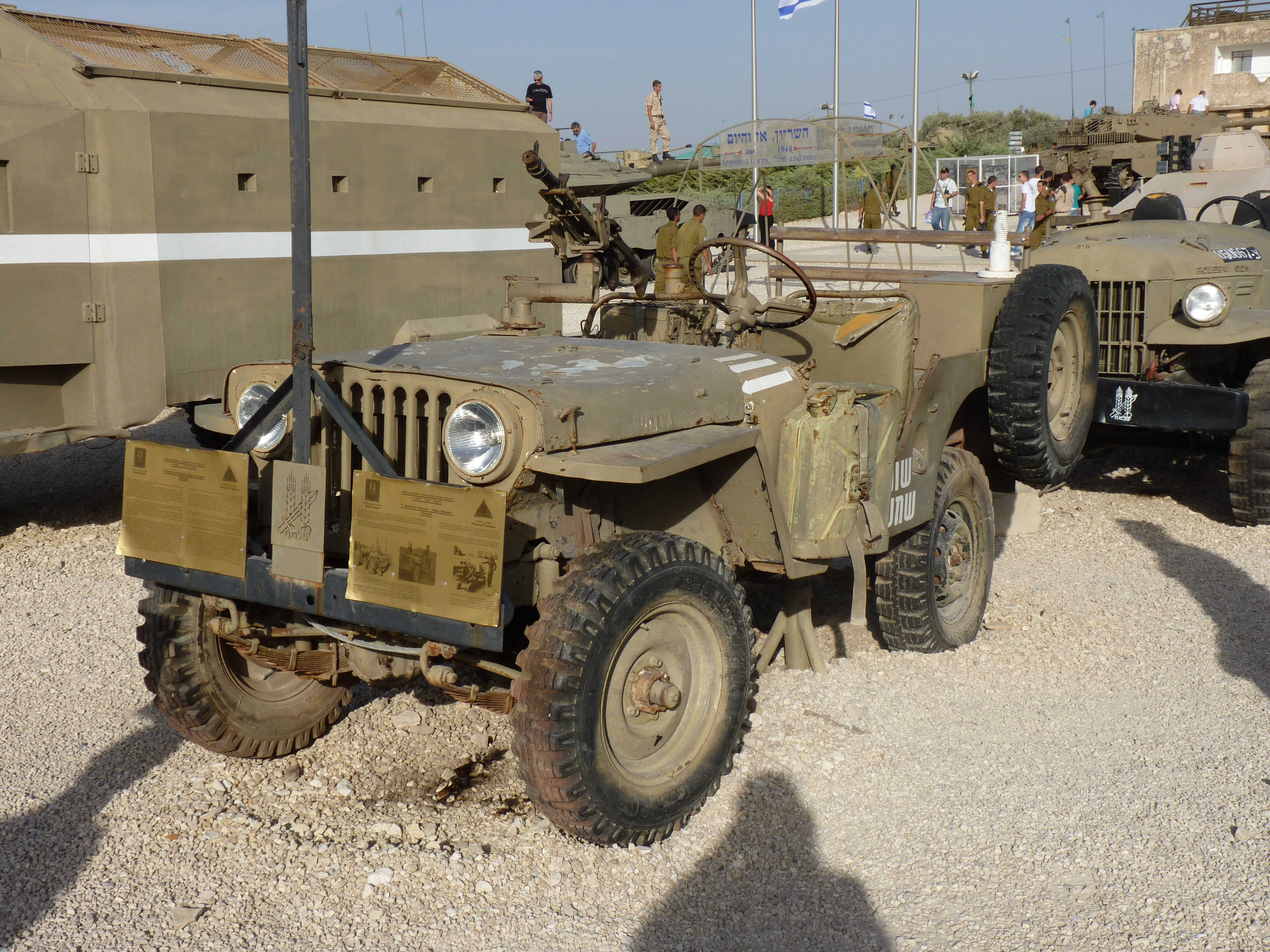 Este quero ter no Rio, pode rodar em qualquer terreno...mesmo alagado Latrun - Armored Corps Museum